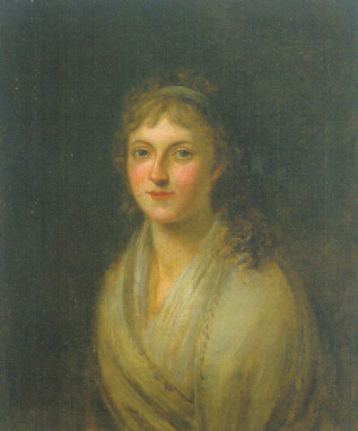 Brustbildnis der Caroline Perthes, geb. Claudius (Ehefrau des Friedrich Christoph Perthes; Tochter von Matthias Claudius). Öl auf Leinwand. 60,5 x 50 cm.